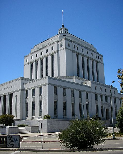 Alameda County Court House, Oakland, Kalifornien